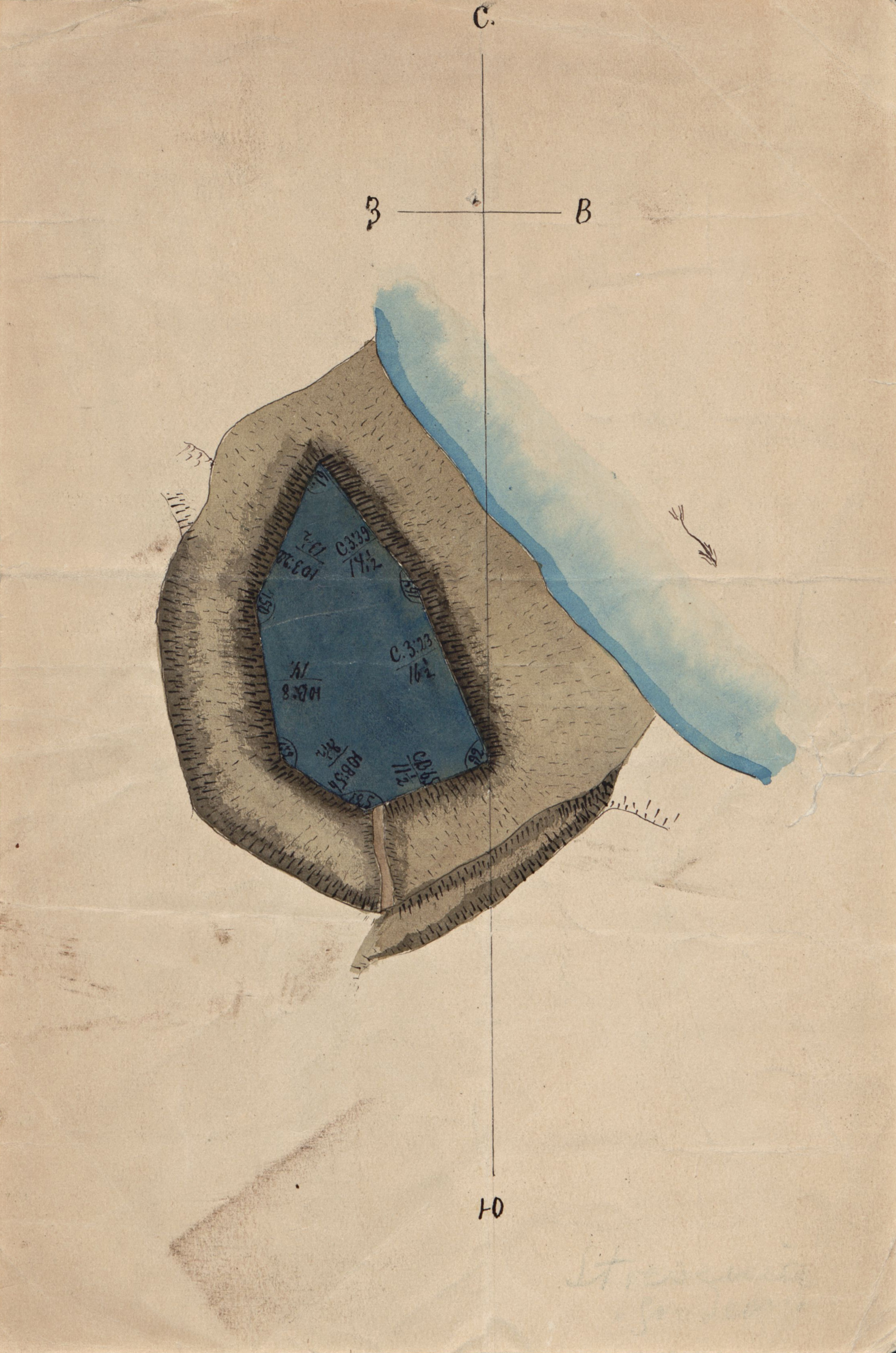 Беларуская (тарашкевіца): Стрэшын (Strešyn). Замак